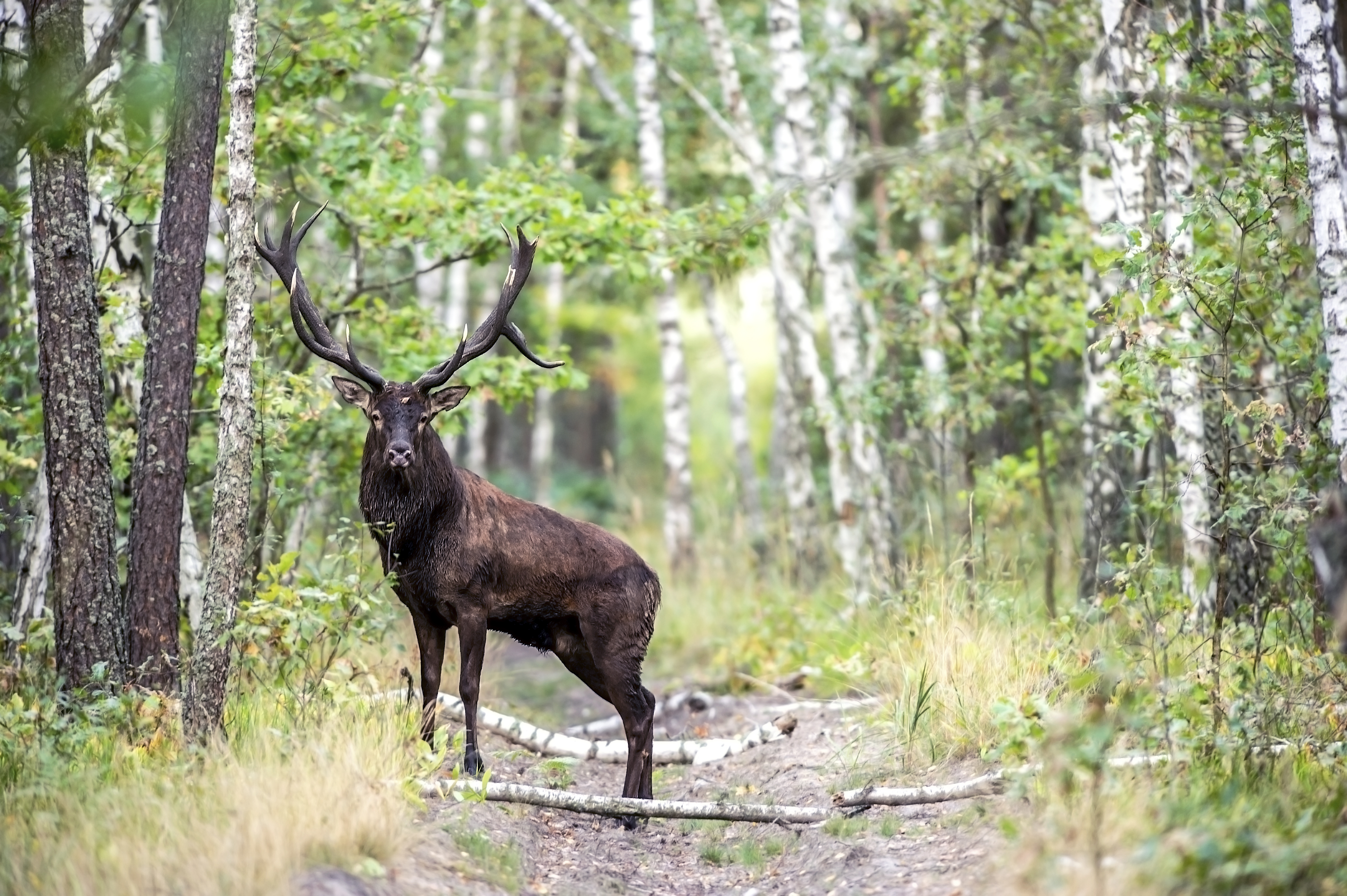 In Mizhrichynskyi Regional Landscape Park